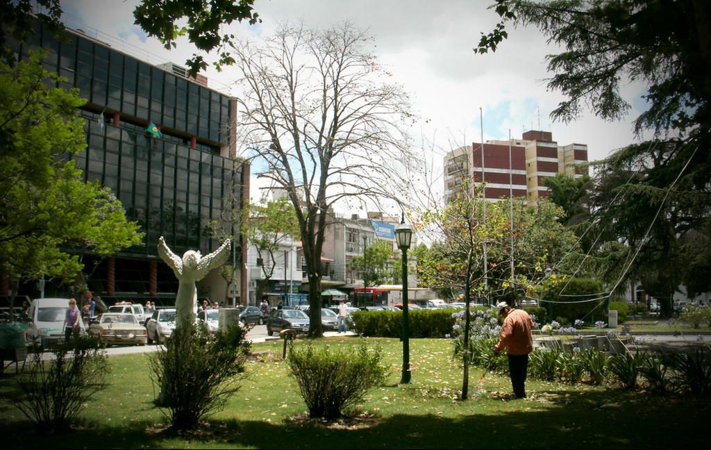 Monumento del angel en la plaza B.Mitre.